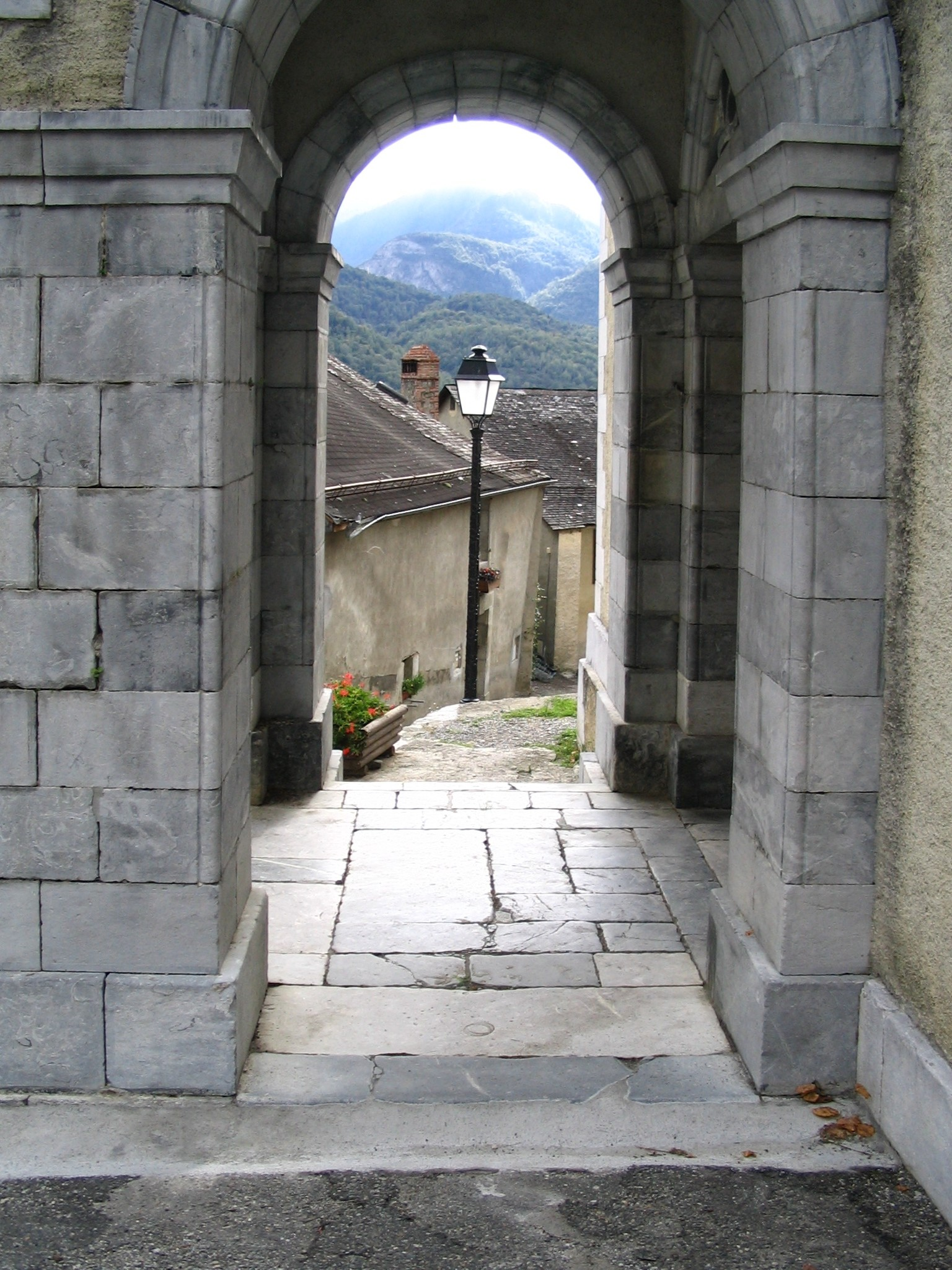 Porche de l'église d'Aas, Pyrénées Atlantiques, France.